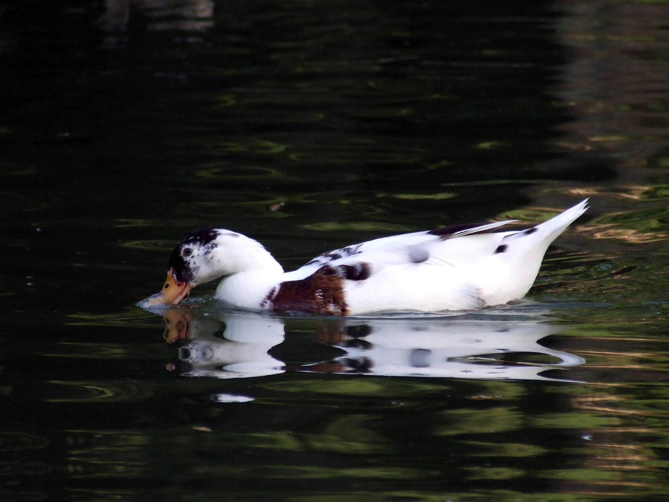 Anatide a Roma, Giardin del Lago di Villa Borghese